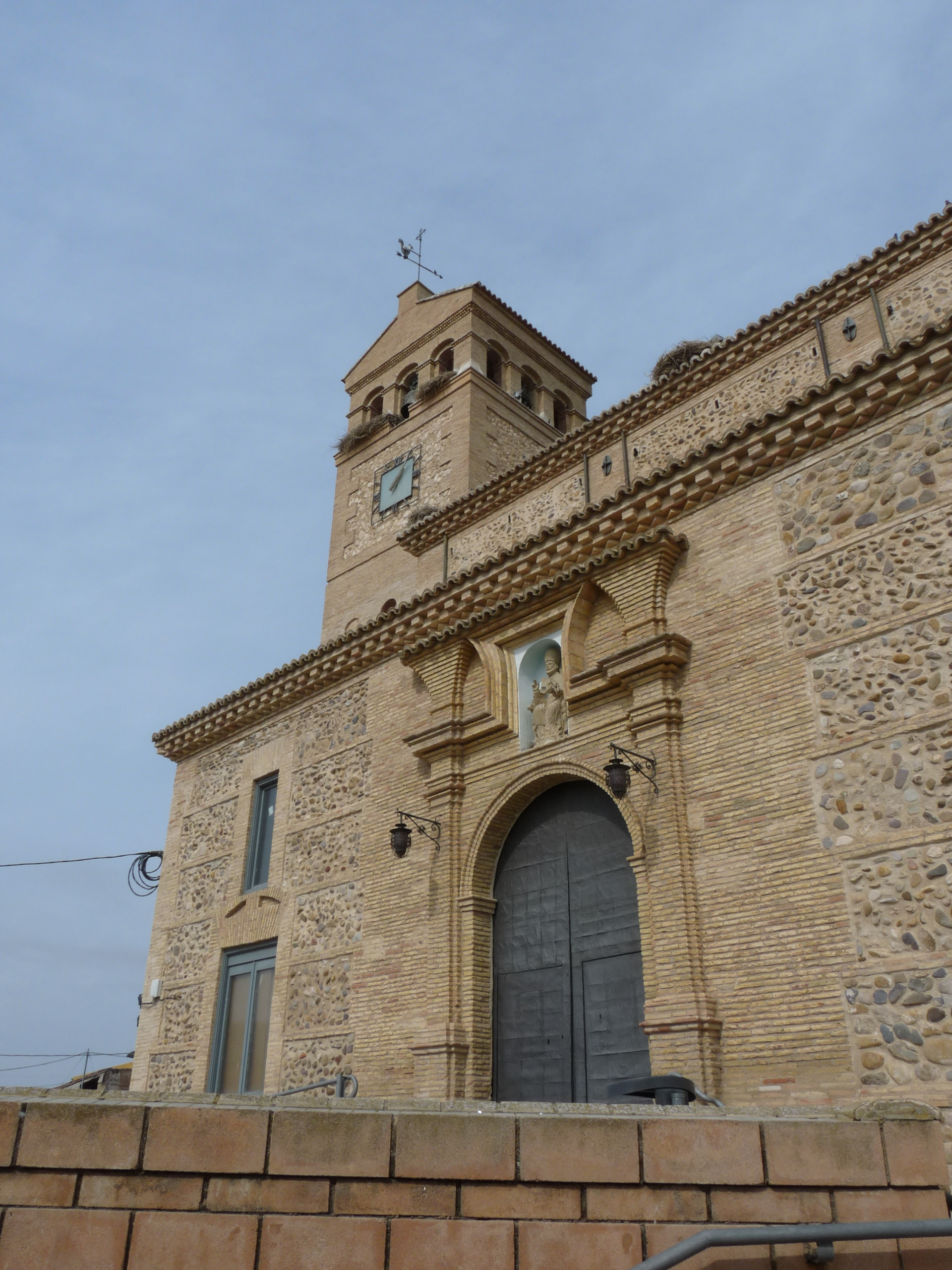 Gallur - Iglesia de San Pedro (s. XVIII) - Portada y torre